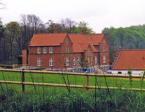 Ormstrup Hovedgård Sahl Sogn, Houlbjerg Herred, Viborg Amt. Denmark